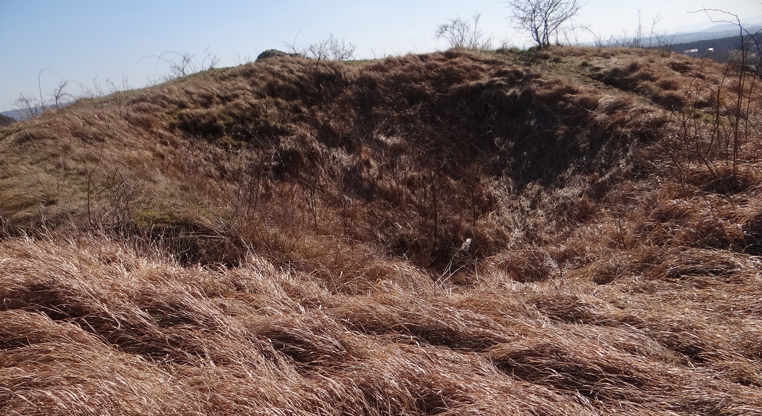 Kozierówka